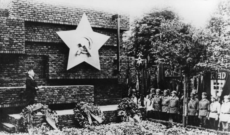 Berlin-Friedrichsfelde, Einweihung Gedenkstätte ADN-ZB 30.11.50 Am 13.6.26 weihte Wilhelm Pieck die Gedenkstätte für die Opfer der Novemberrevolution in Berlin- Friedrichsfelde ein. 1933 wurde diese Gedenkstätte von den Nazis zerstört, 1950 wurde sie wieder aufgebaut. [Berlin-Friedrichsfelde.- Einweihung des von Ludwig Mies van der Rohe entworfenen ?Denkmal für Karl Liebknecht und Rosa Luxemburg? duch Wilhelm Pieck.] Abgebildete Personen: Pieck, Wilhelm: Präsident, Politbüro der SED, Vorsitzender der KPD, DDR